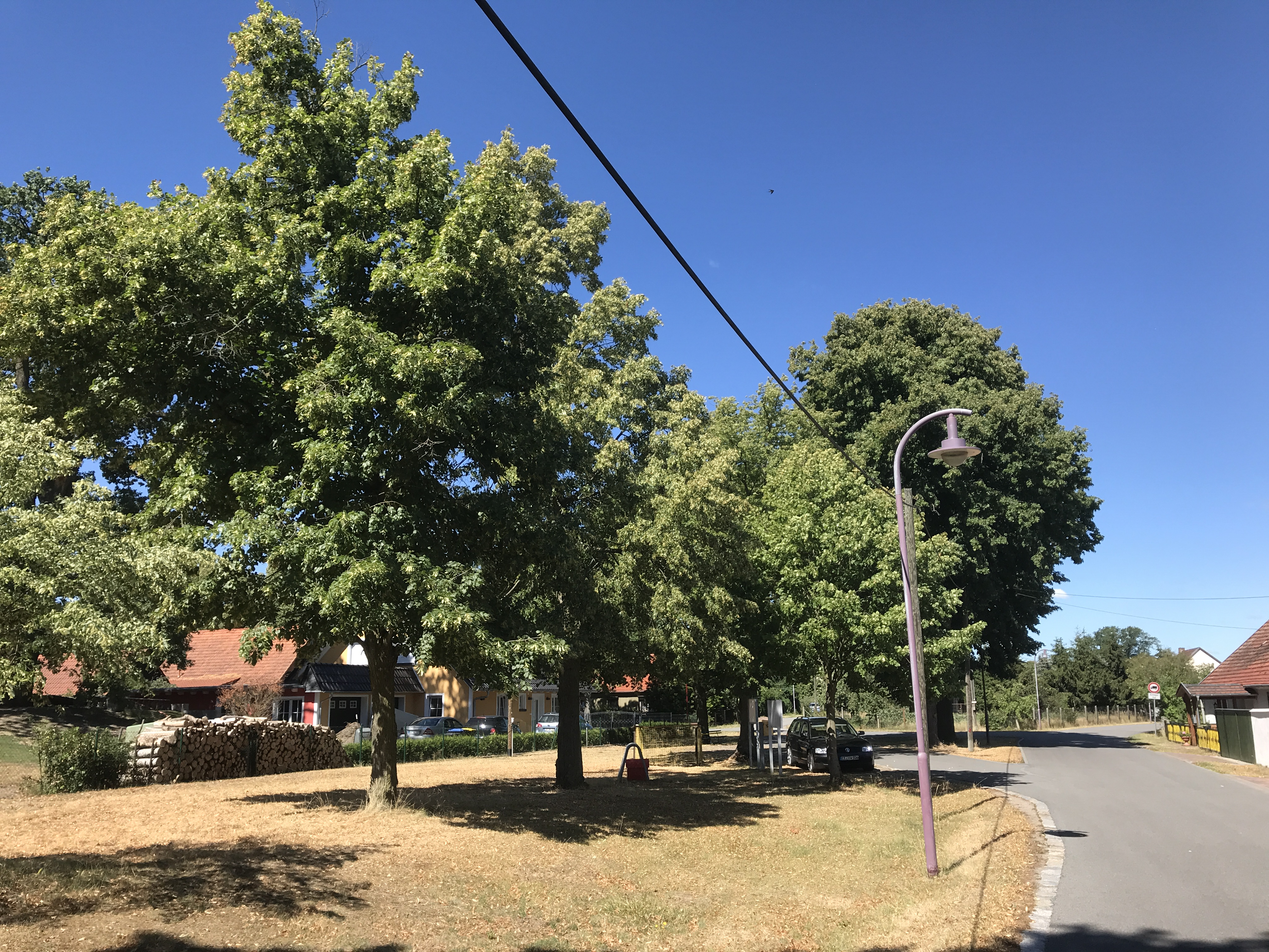 Dorfanger von Friedrichshof, einem Ortsteil der Gemeinde Rietzneuendorf-Staakow im Landkreis Dahme-Spreewald im Land Brandenburg